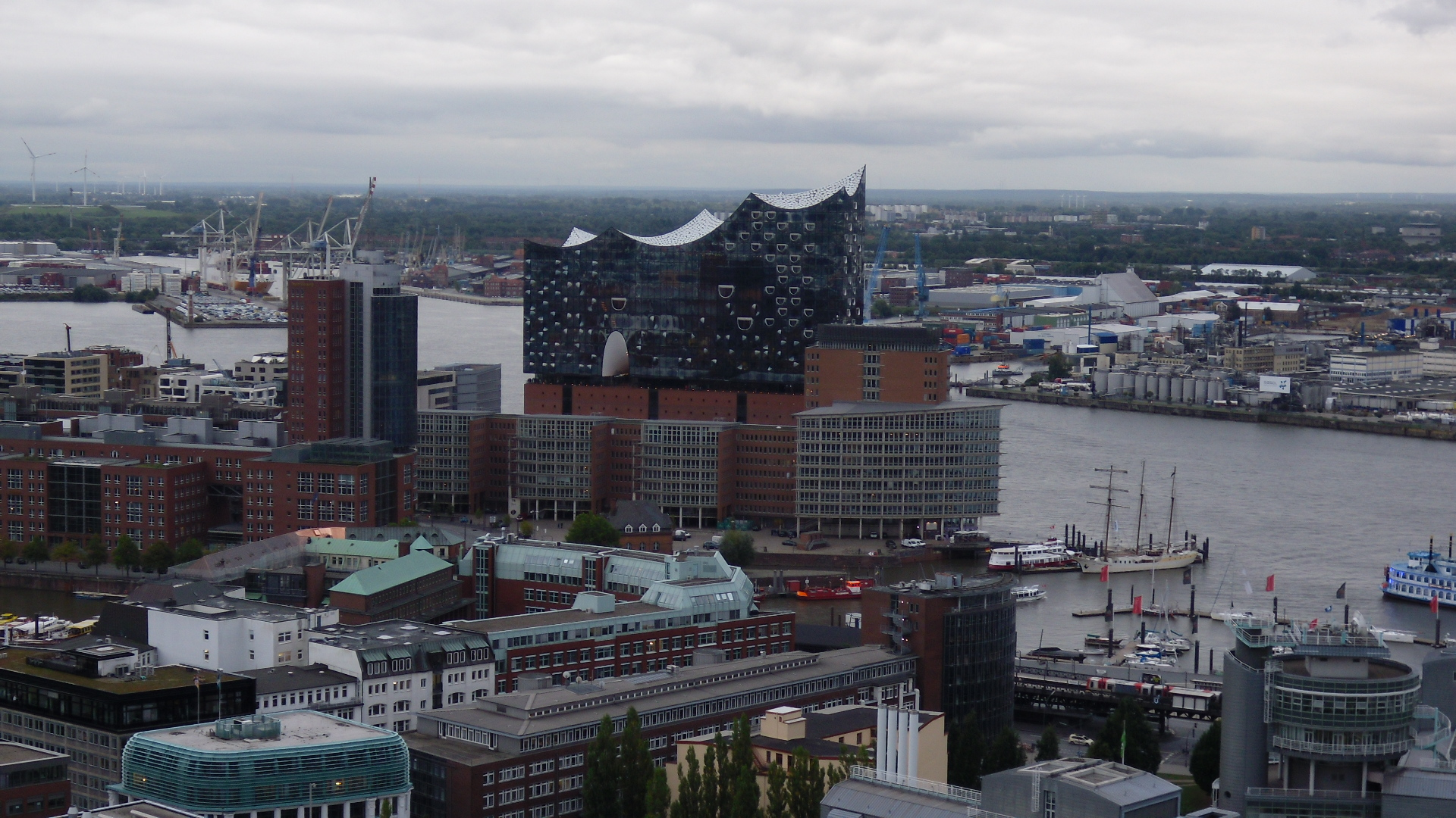 Blick auf Elbphilharmonie mit Speicherstadt vom Hamburger Michel.